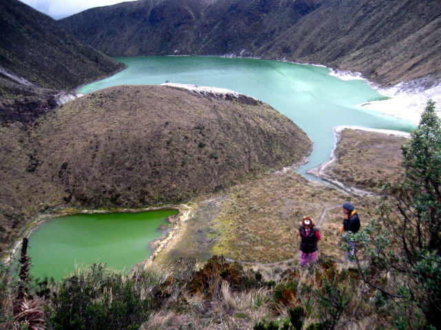 Laguna Verde, panorámica desde el mirador, hermoso espectáculo, se sitúa a 12 km. al occidente de la ciudad de Túquerres, Colombia.